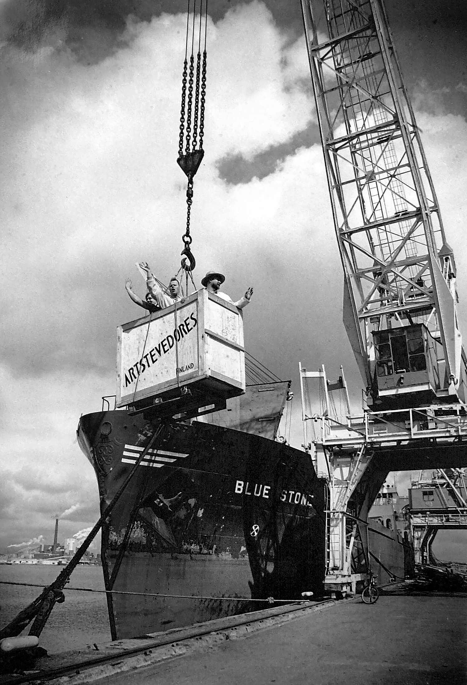 Taideahtaajat 1993 Timo Mähönen, Juha Metso, Heimo Suntio